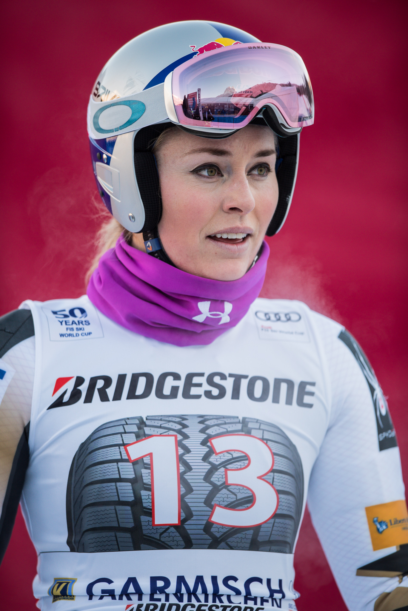 64. Kandahar Rennen,Audi FIS Ski Weltcup Garmisch-Partenkirchen,Damen Abfahrt,Kandahar,Ladies Downhill,Lindsey Vonn